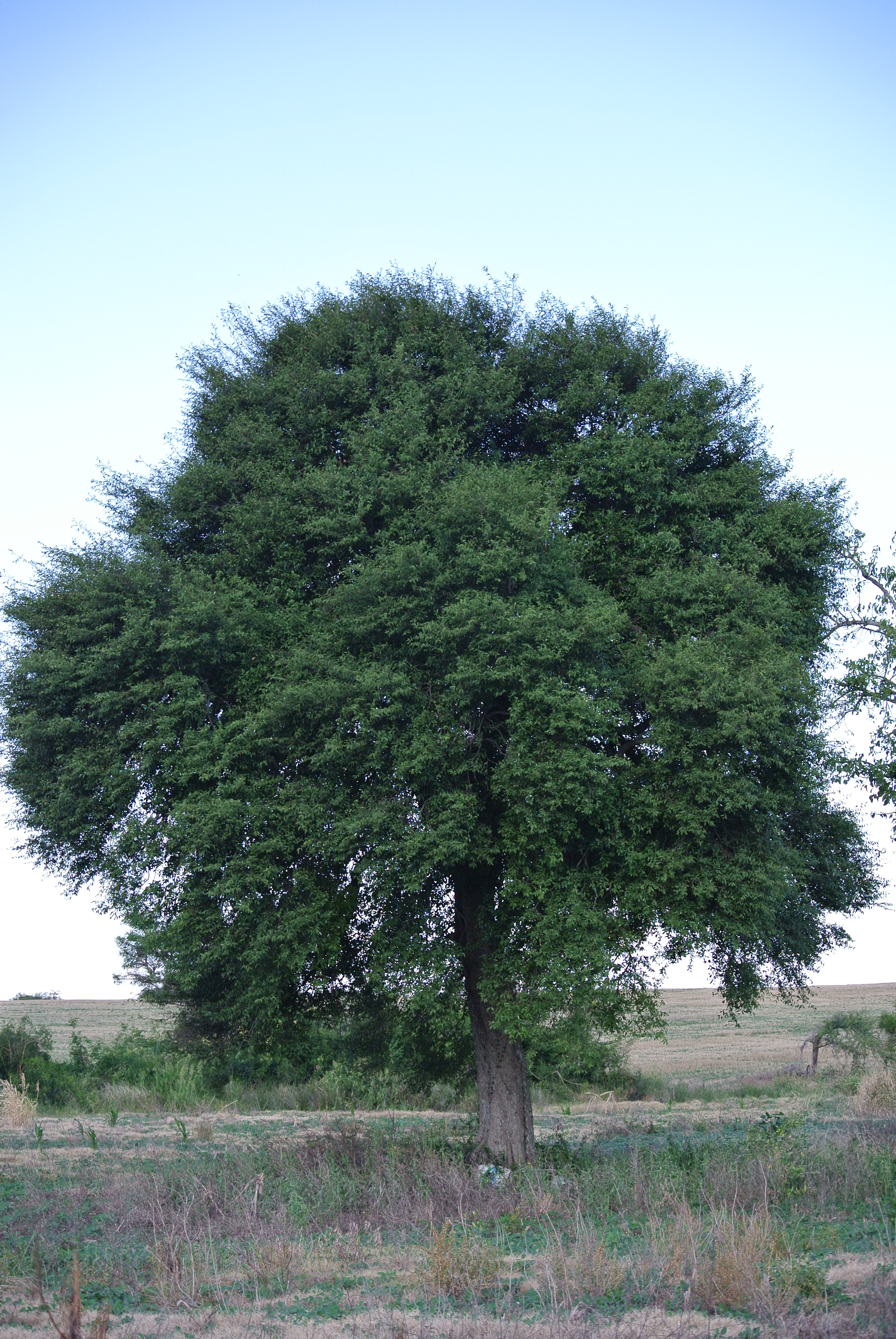 Árbol de Guaraniná, encontrado en La Paz, Provincia de Entre Ríos, República Argentina